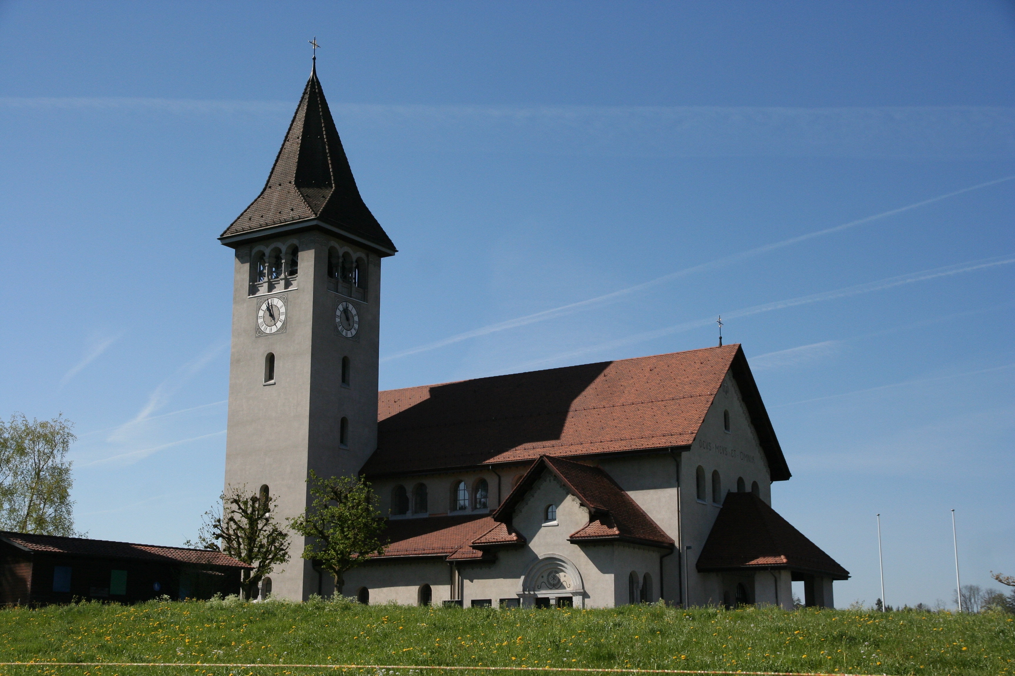 Römisch-katholische Pfarrkirche St. Franziskus Wetzikon